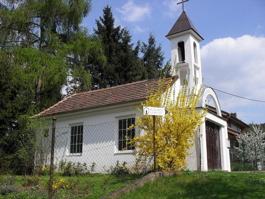 Řež, kaple svatého Václava